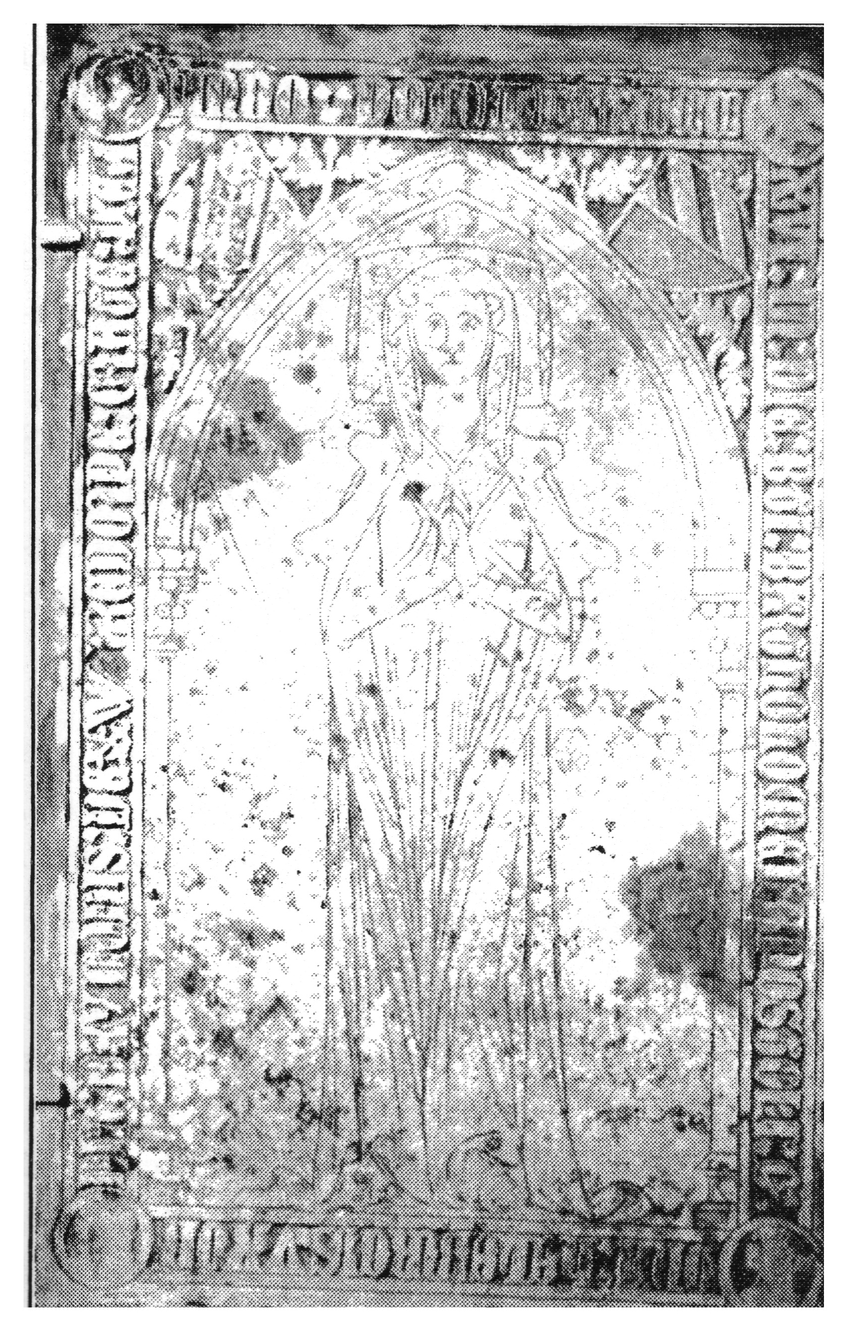 Grabplatte der 1316 verstorbenen Helenburg von Warendorp, Ehefrau des Lübecker Bürgermeisters Brun von Warendorp (gest. 1341), im Lübecker Dom